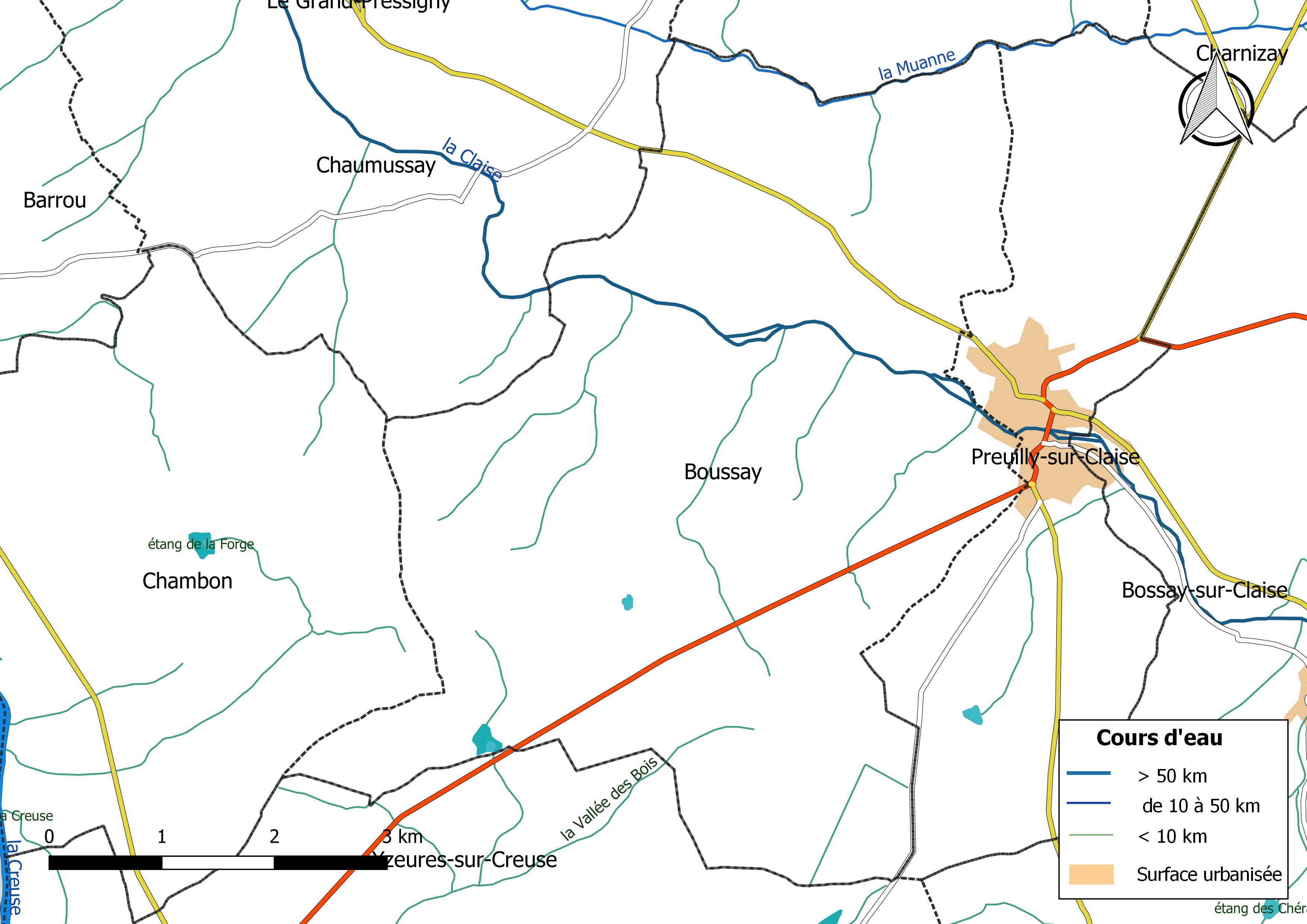 Carte du réseau hydrographique de la commune de Boussay (Indre-et-Loire) (France).